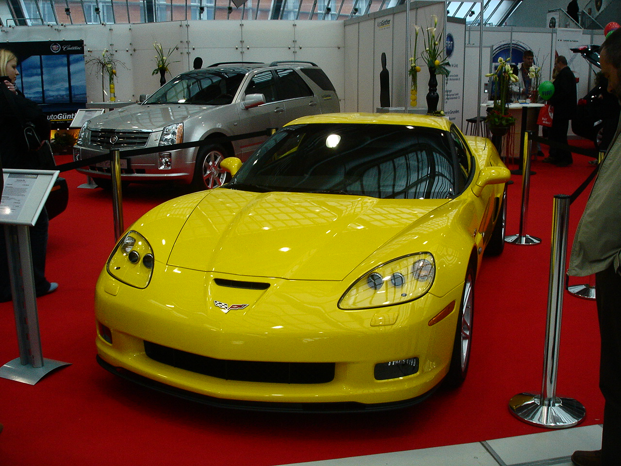 Front einer gelben Corvette Z06 auf dem Linzer Autofrühling